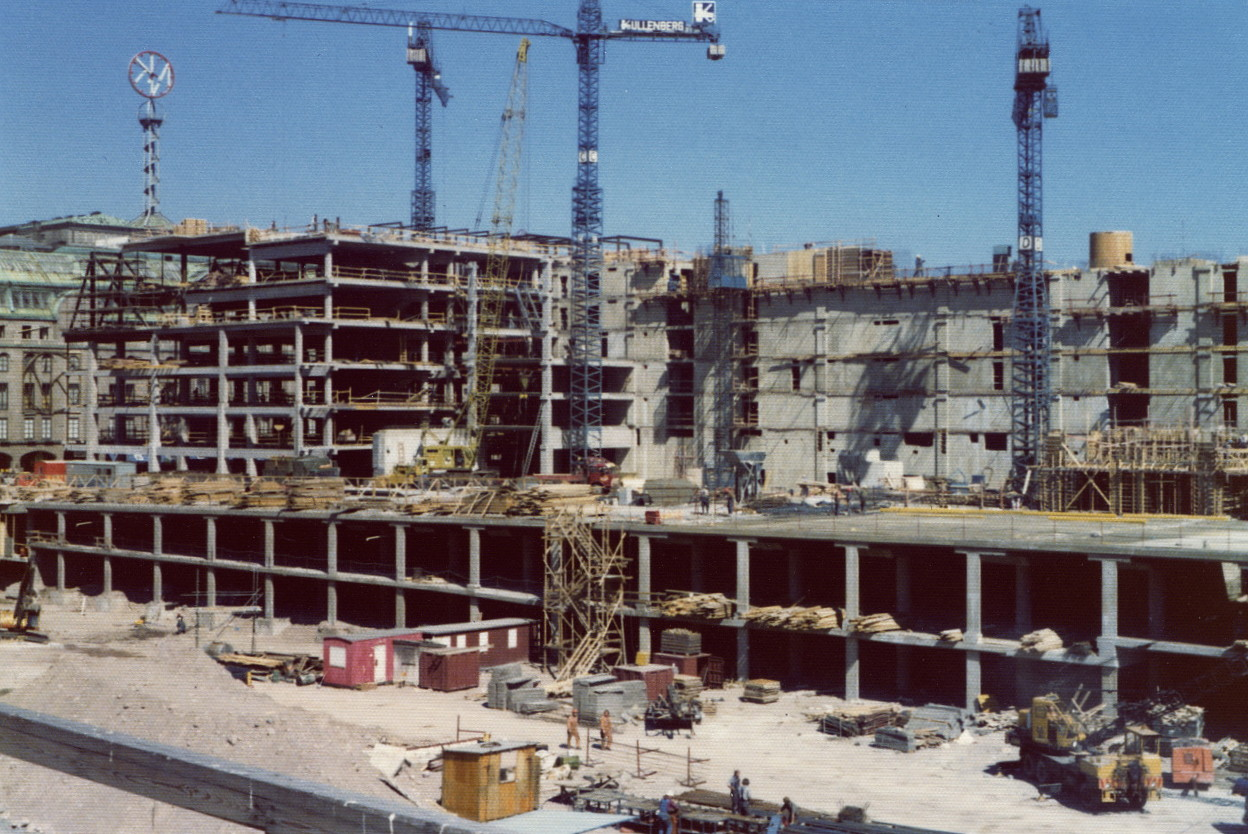 Pågående byggnation i kvarteren Trollhättan och Spektern (Gallerian). Till vänster skymtar varuhuset NK vid Hamngatan 18-20 i kvarteret Hästen. 1974-1974FOTOGRAF: Iwarsson, Arne.BILDNUMMER: POSF 1572Stockholms stadsmuseum, Sweden